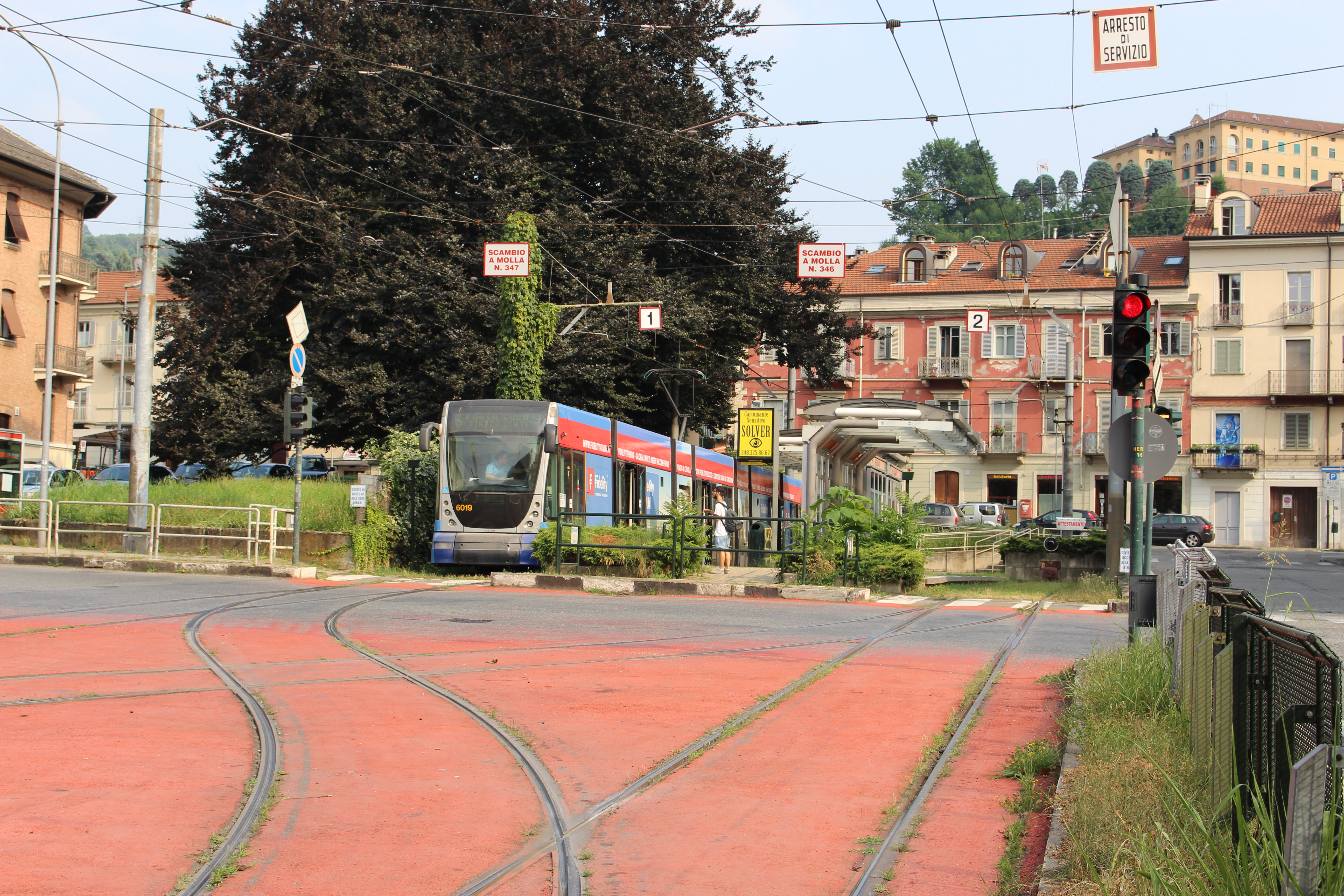 Un cityway in servizio sul 6 in piazza Hermada